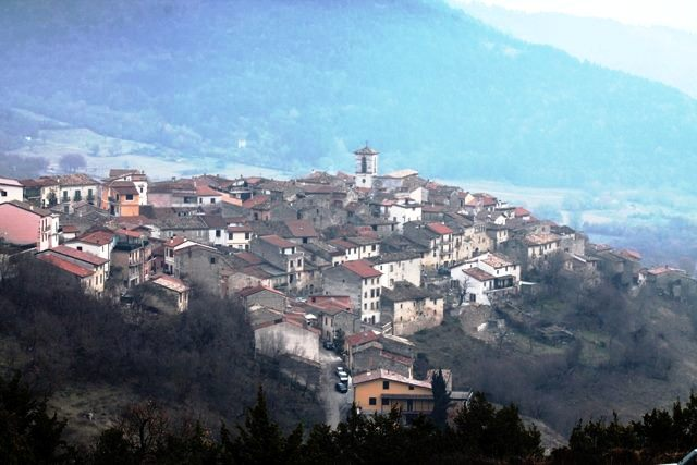 Rosciolo